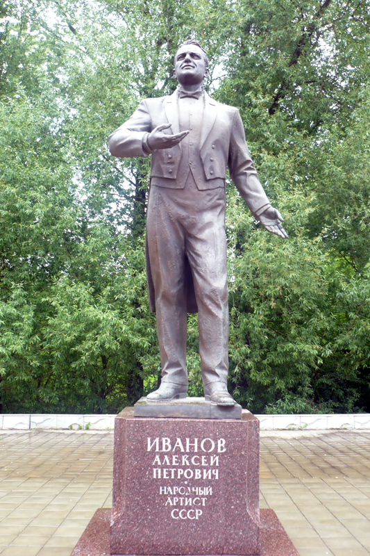 Памятник оперному певцу Иванову А.П. в г.Бежецке